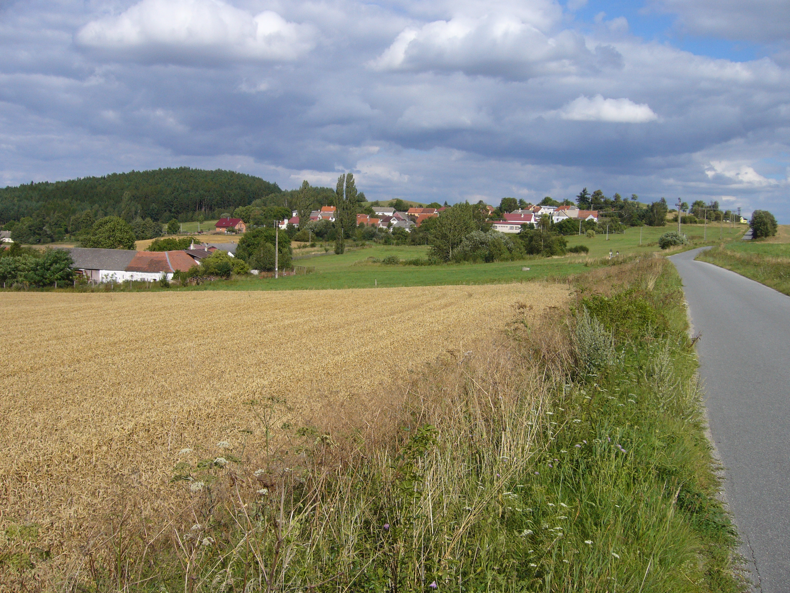 Celkový pohled na vesnici